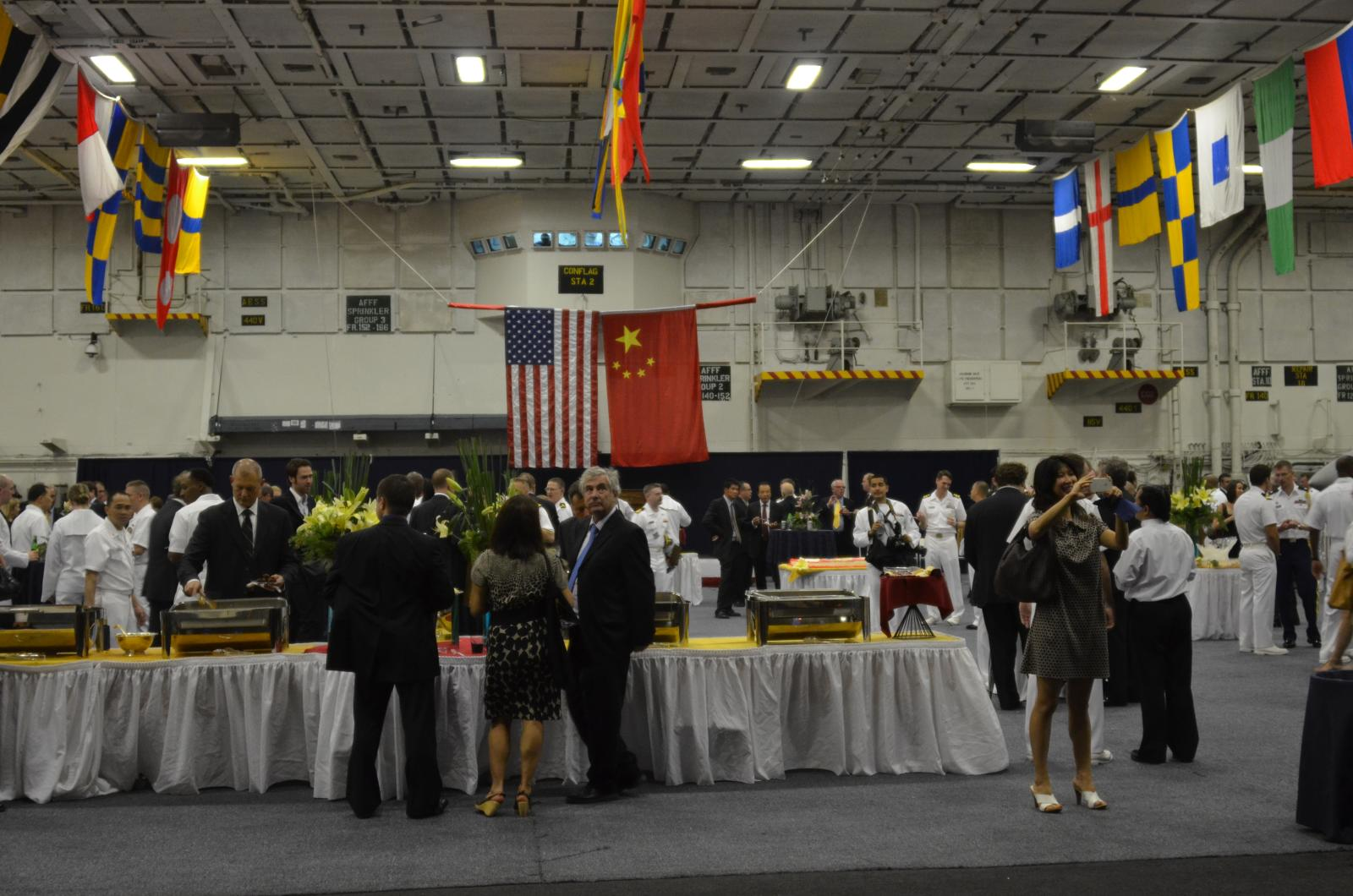 USS Carl Vinson at Hong Kong